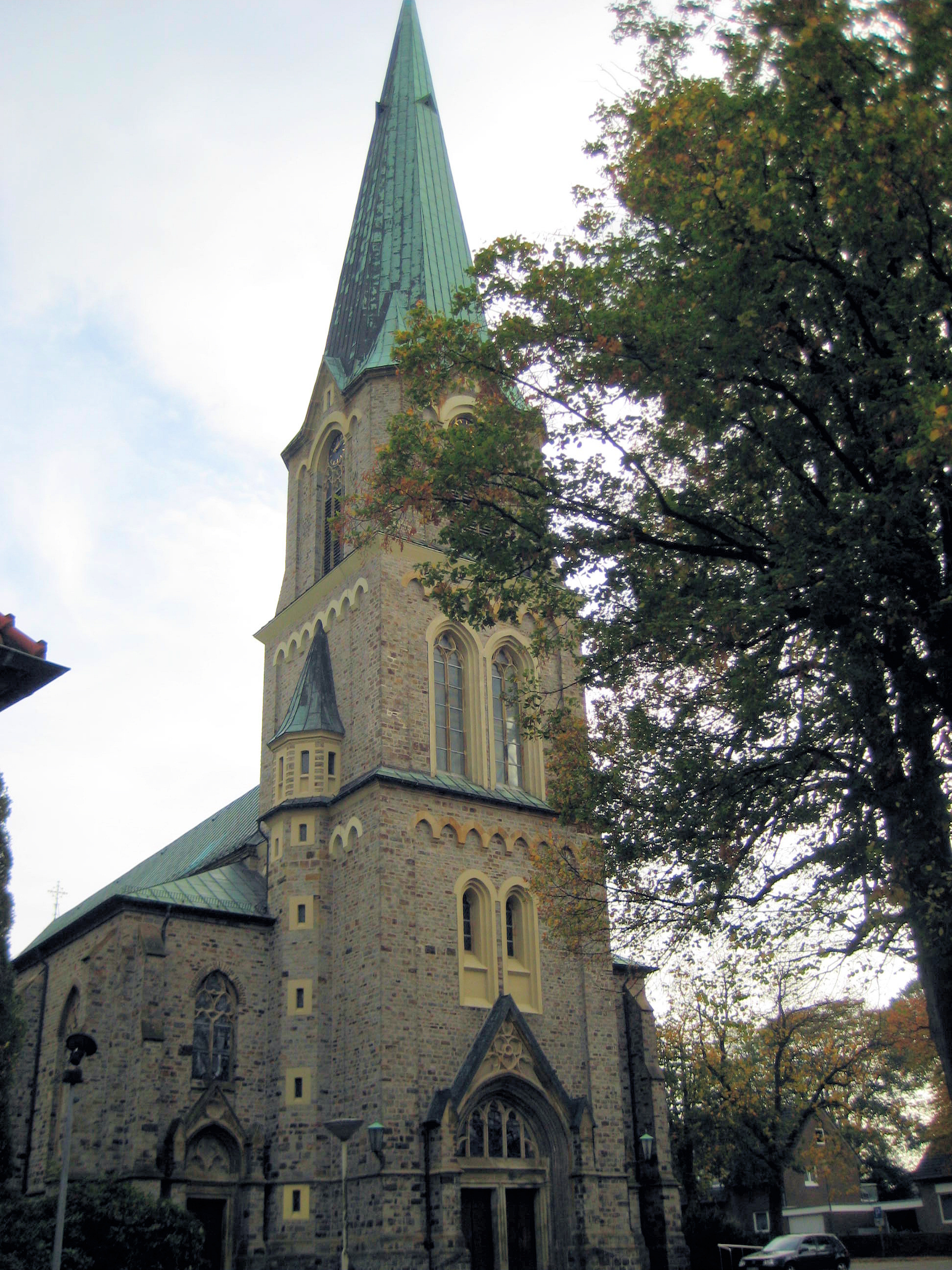 Neue St. Alexanderkirche in Wallenhorst